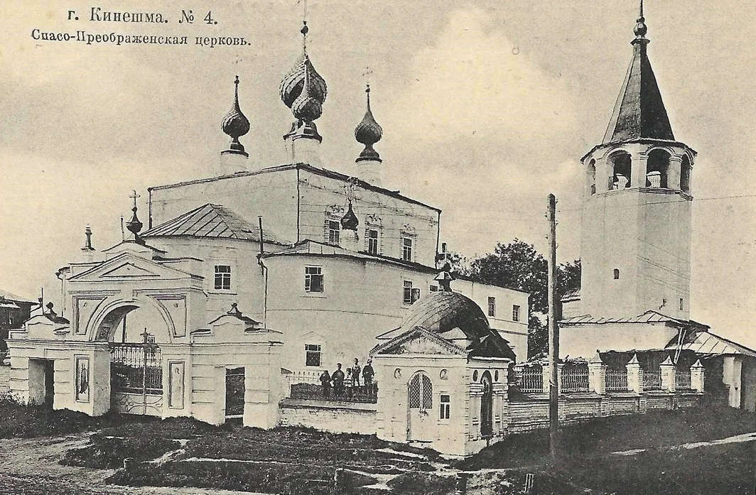 Храм Спаса Преображения Господня в Кинешме